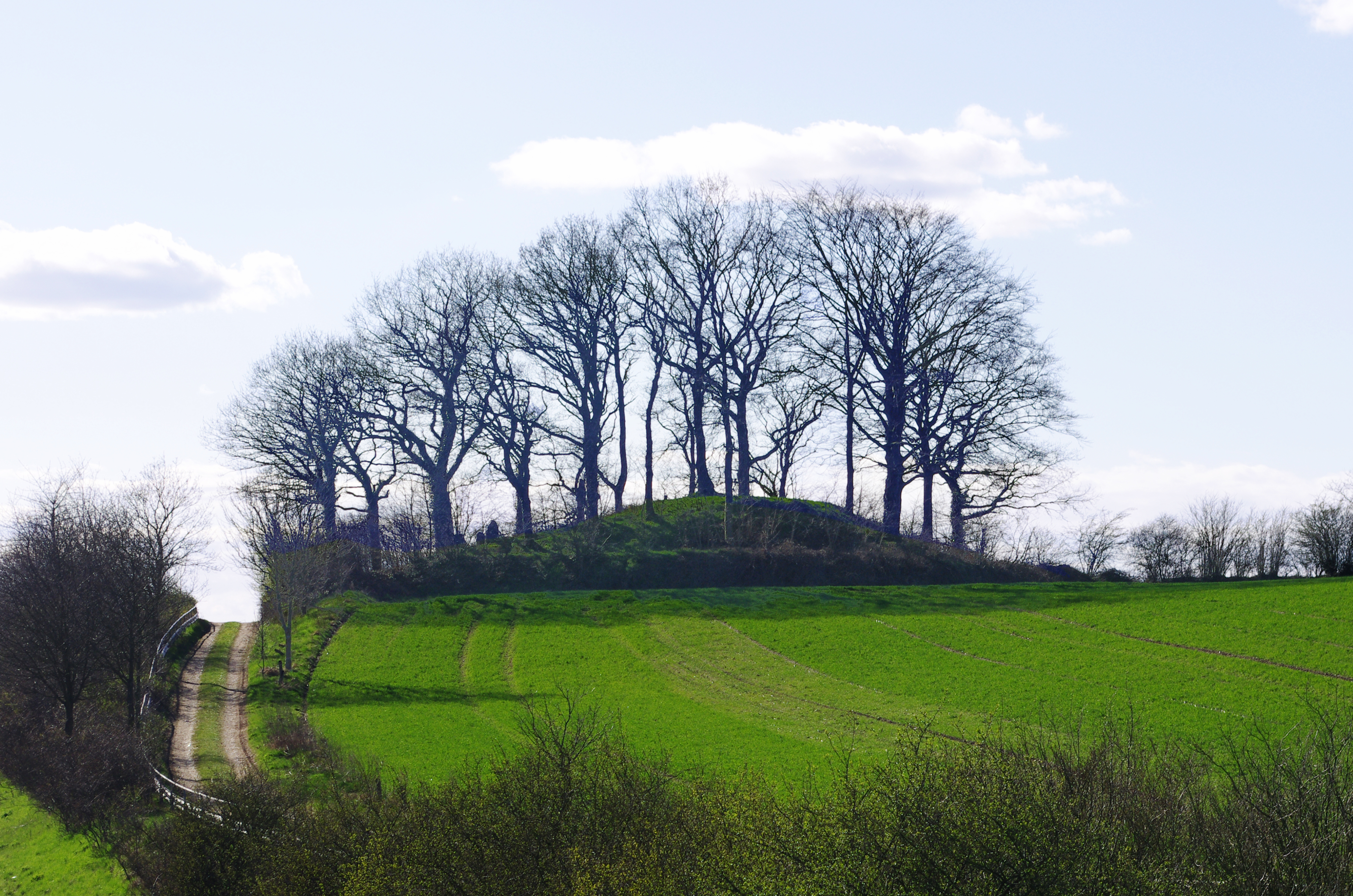 Brautberg in Bordesholm, Ansicht von Osten im April 2012